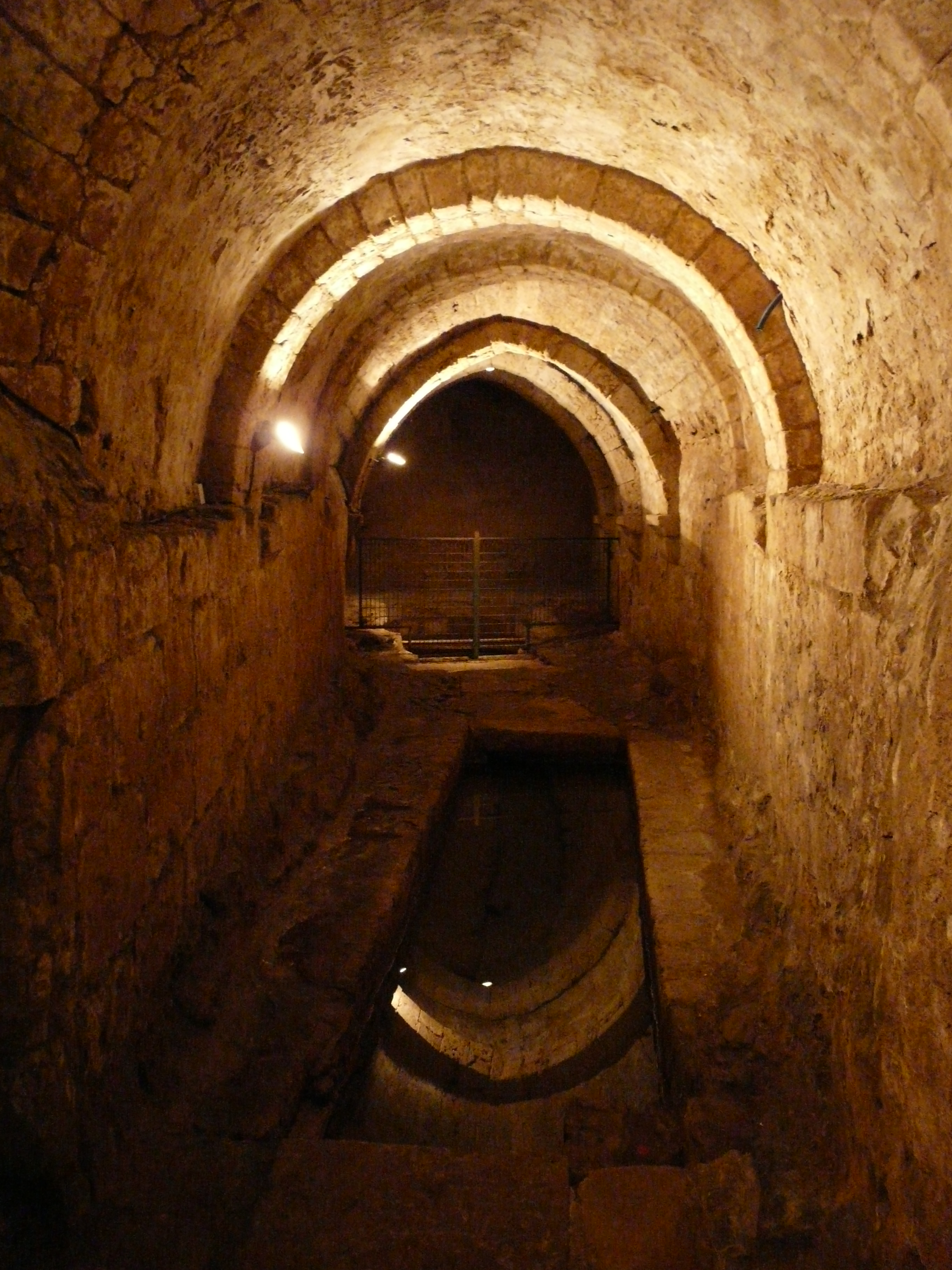 Fontaine souterraine d'Airvault, Deux-Sèvres, France